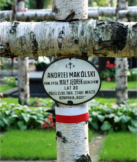 Andrzej Makólski, mogiła na Powązkach Wojskowych w Warszawie